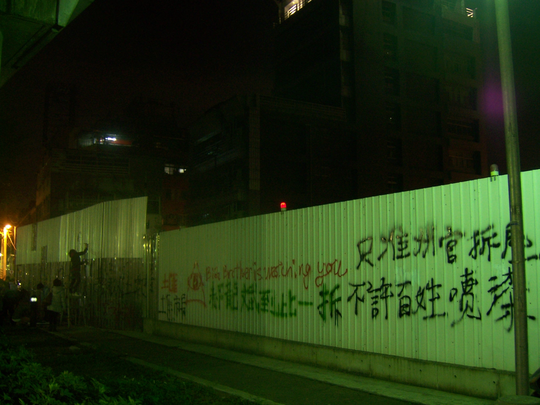 王宅拆除後，文林苑工地旁的抗議噴漆。